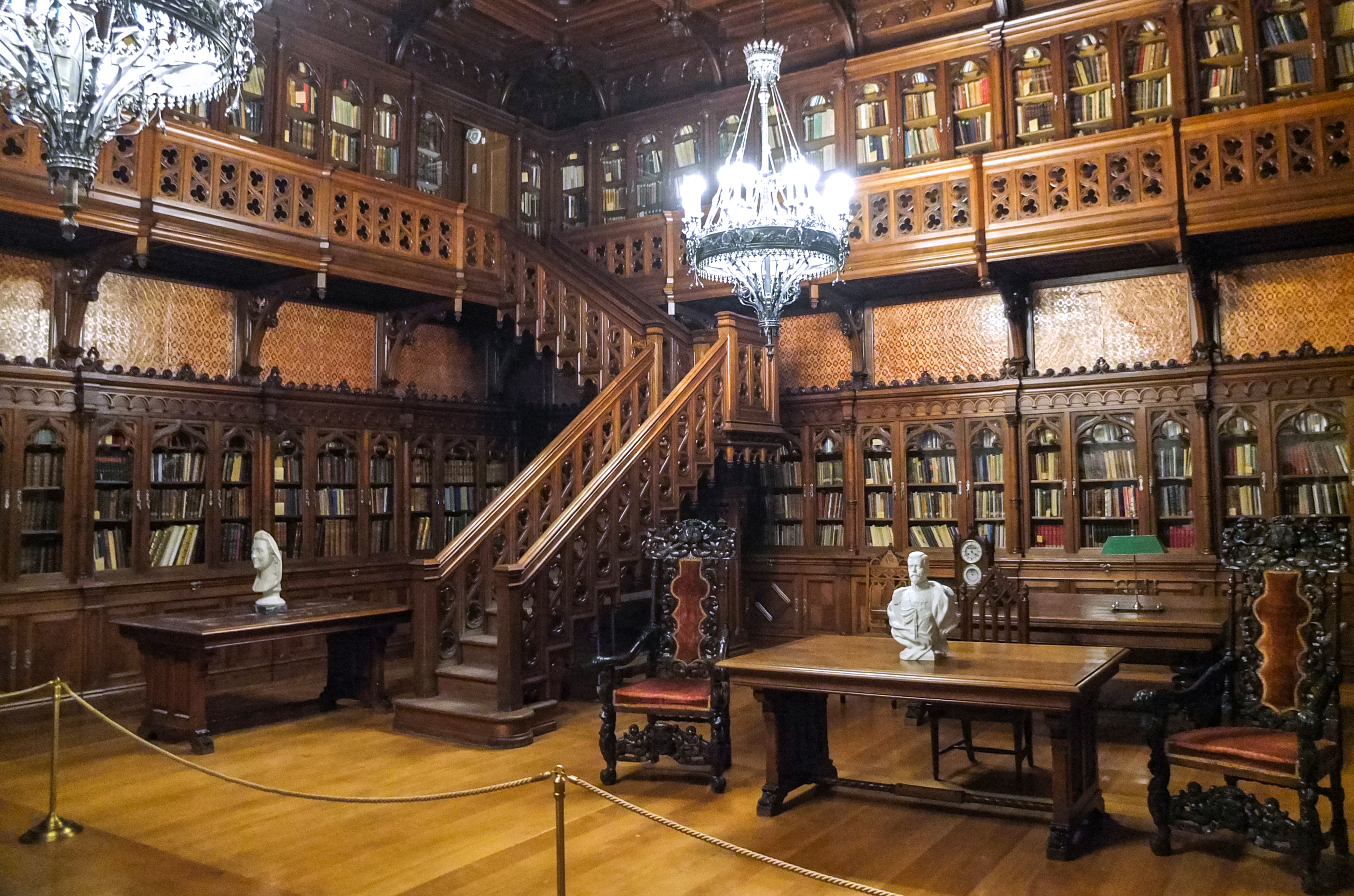 Зимний дворец, Центральный район, Санкт-Петербург